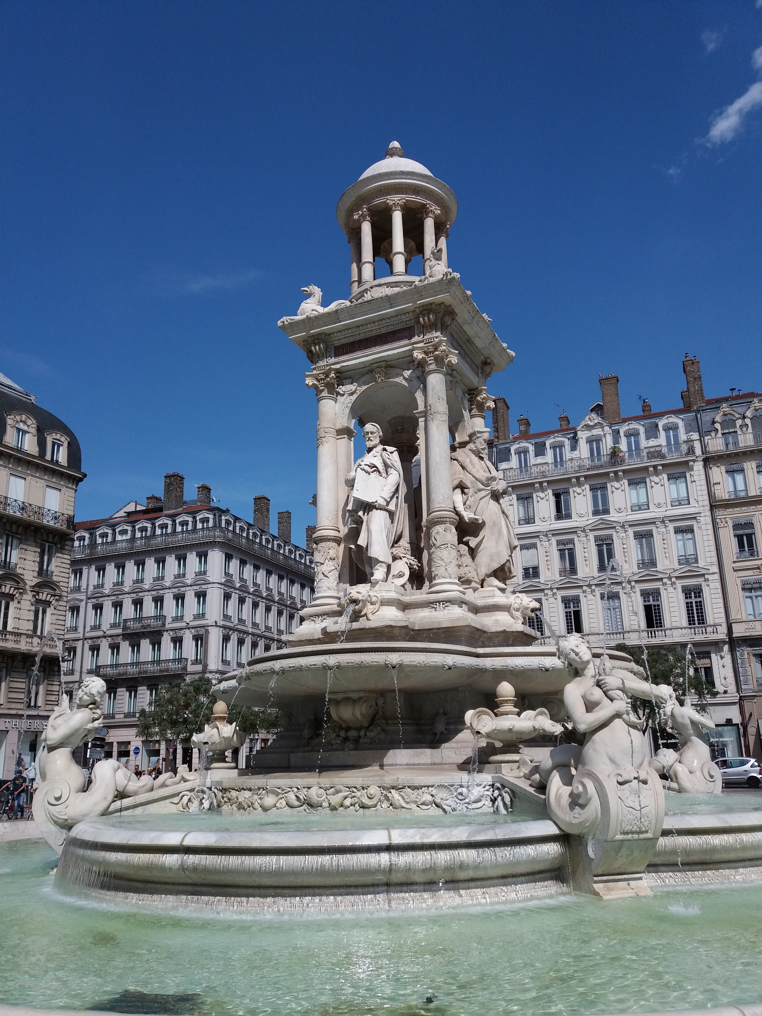 Angle des statues Hippolyte Flandrin et Philibert Delorme.